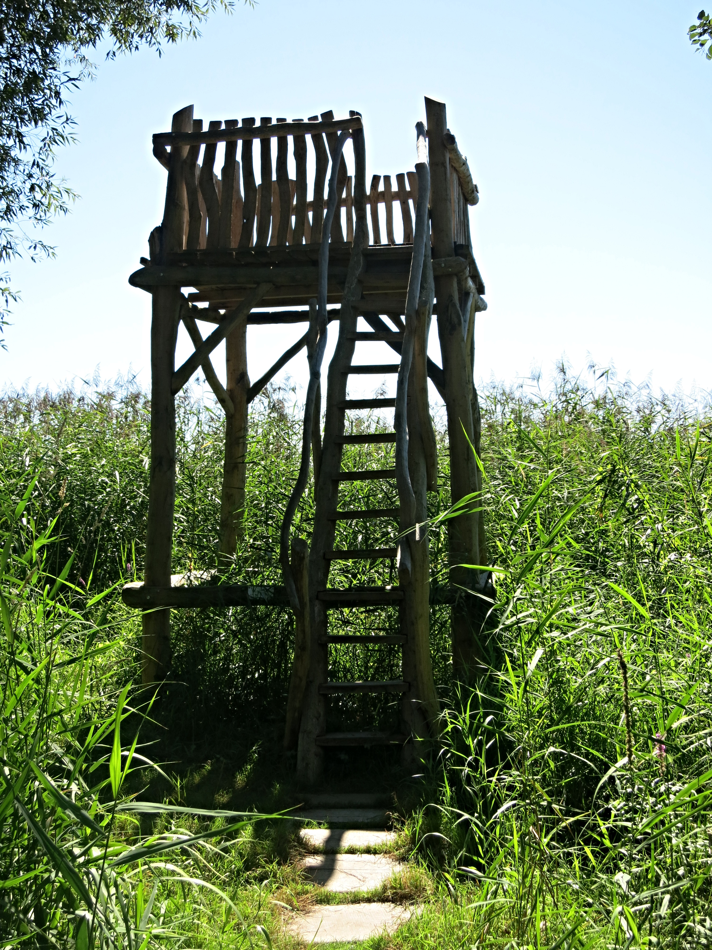 Murtensee Aussichtsplattform